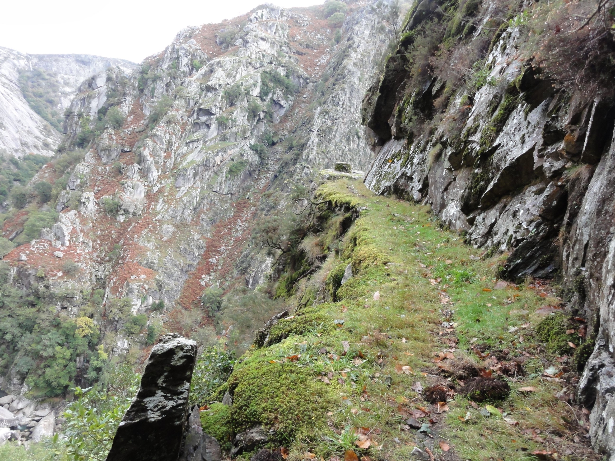 Fragas do Eume This is a photography of a Special Area of Conservation in Spain with the ID: ES1110003. Natura2000 entry, EEA entry